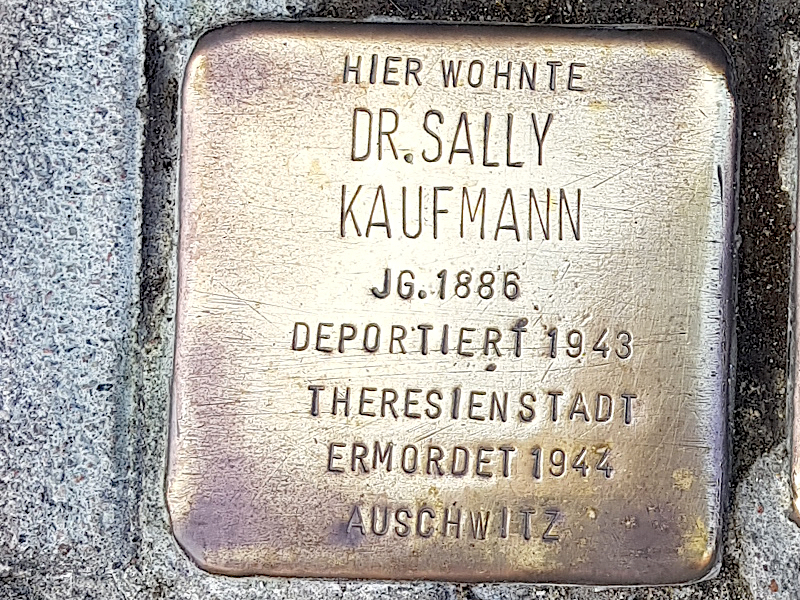 Stolperstein für Sr. Sally Kaufmann, Prinz-Albrecht-Str. 17, Duisburg-Duissern, Jg. 1886, deportiert 1943 ins KZ Theresienstadt, ermordet 1944 im Vernichtungslager Auschwitz